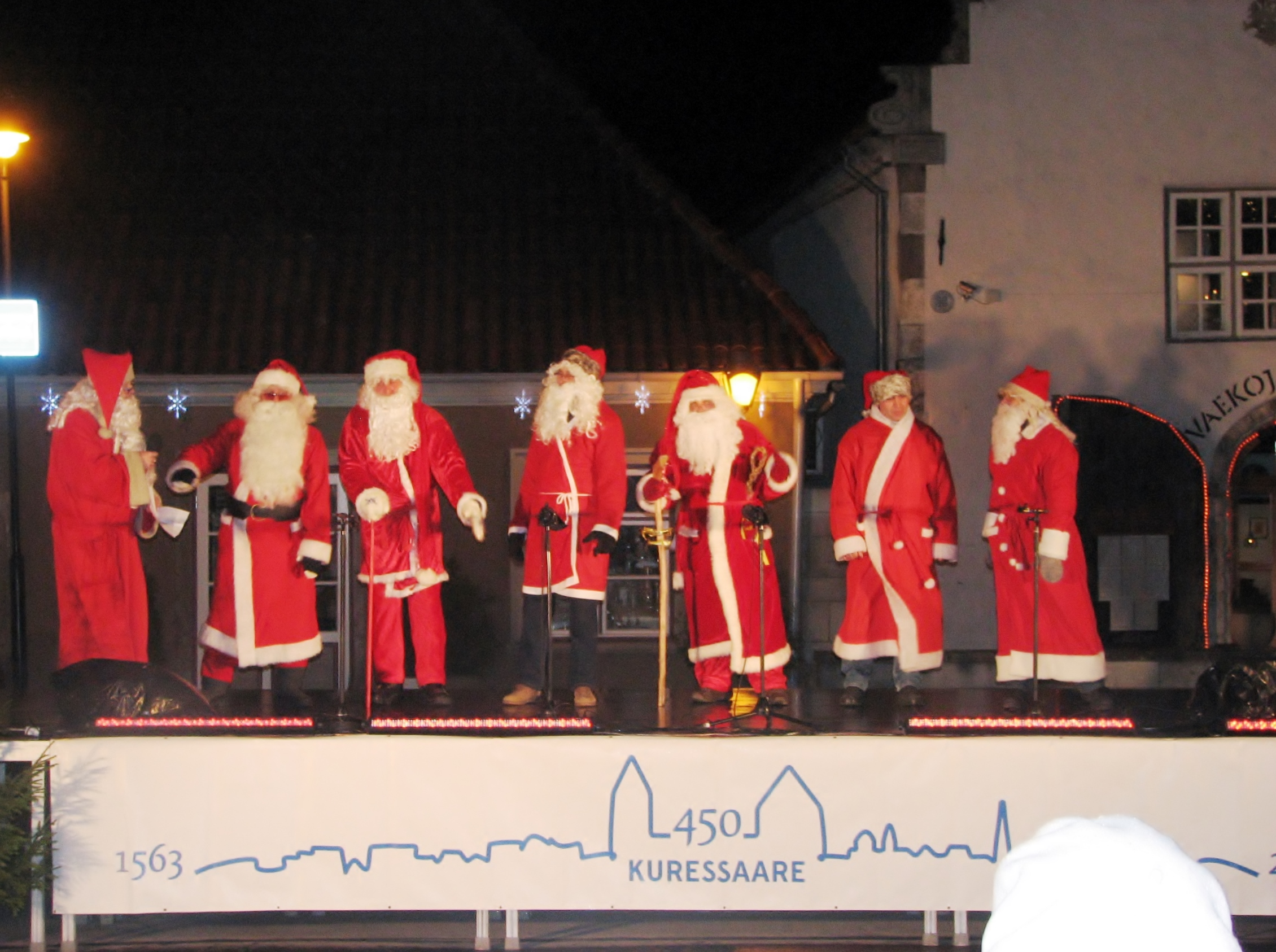 Jõuluvanade XIII konverents Kuressaares